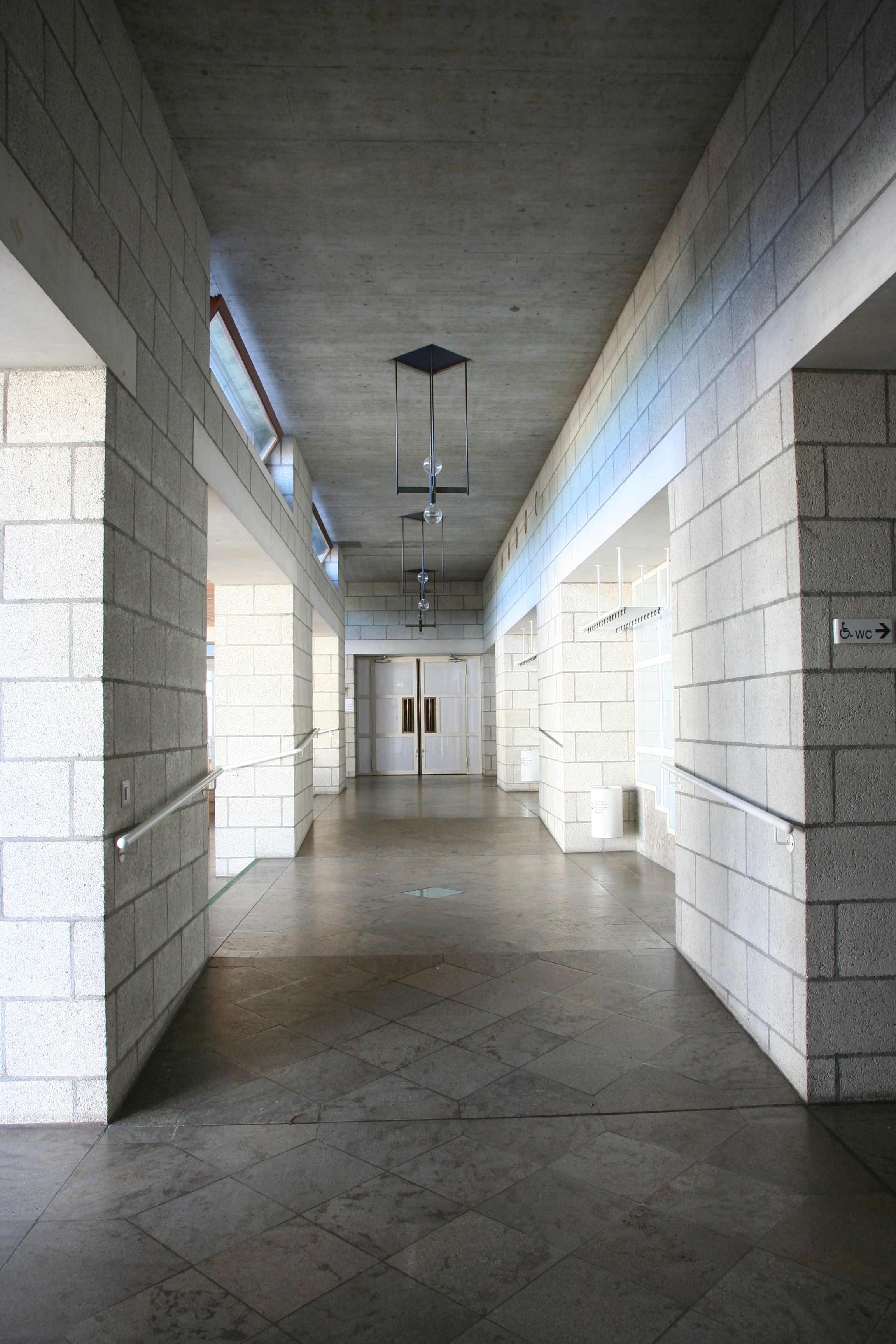 Römisch-katholische Pfarrkirche St. Josef Affoltern am Albis, Foyer